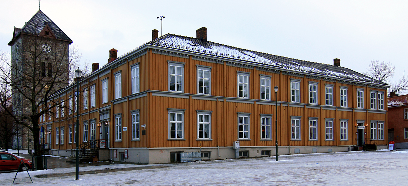 Hornemannsgården, Kongens gate 7, Trondheim. Bygd ca. 1780. Fredet.